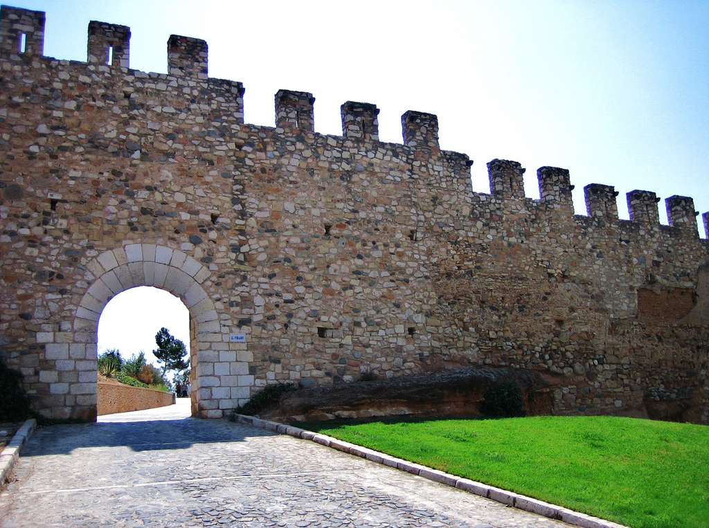 Montblanc